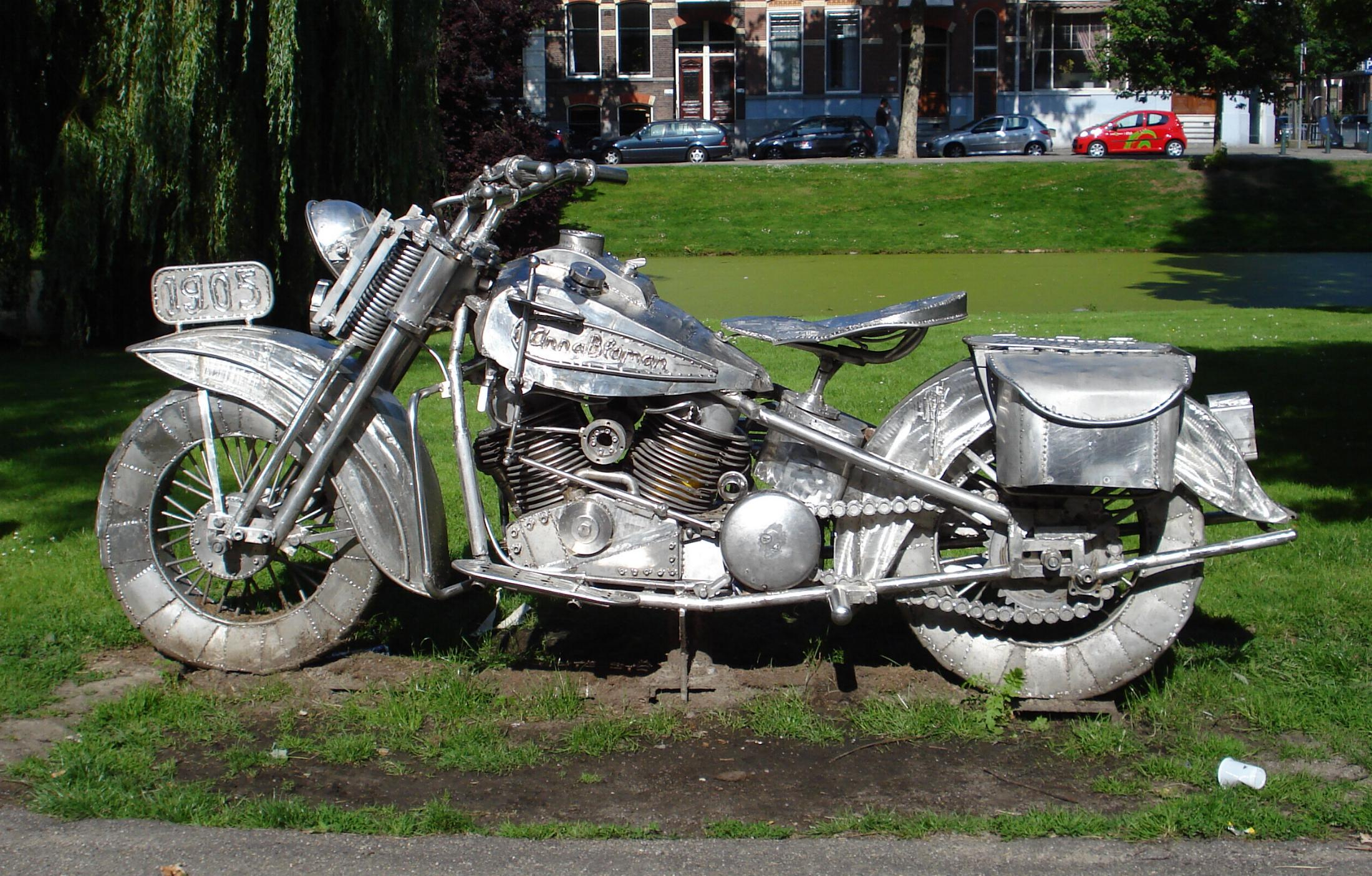 Rotterdam, Heemraadsingel. Kunstwerk "Eenzaam Avontuur - Monument Anna Blaman" van Maria Roosen. Rotterdam/The Netherlands.